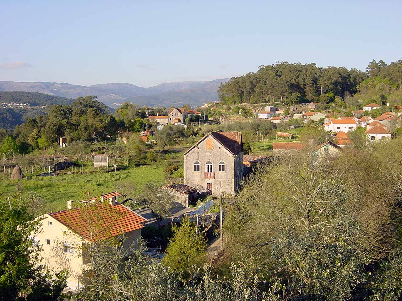 Description